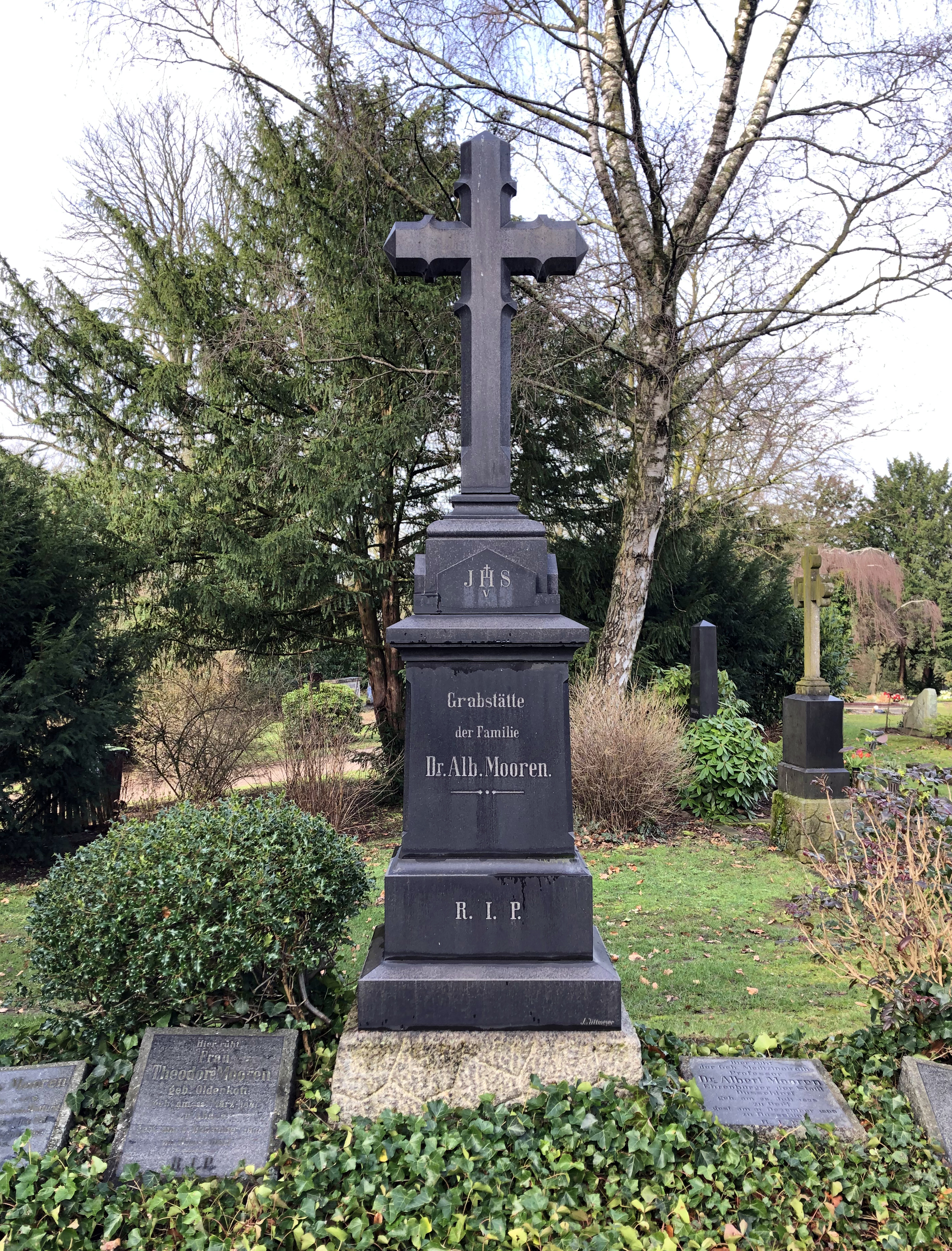 Grabstätte der Familie Dr. Albert Mooren, Nordfriedhof Düsseldorf, Ehrengrab (Feld 64, Nr. 38957–60)